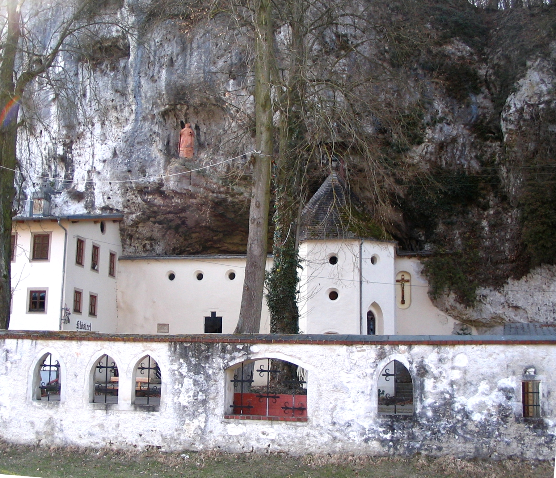 Landkreis Kelheim, Niederbayern: Das ehemalige Kloster Trauntal (kurz Klösterl) bei Kelheim